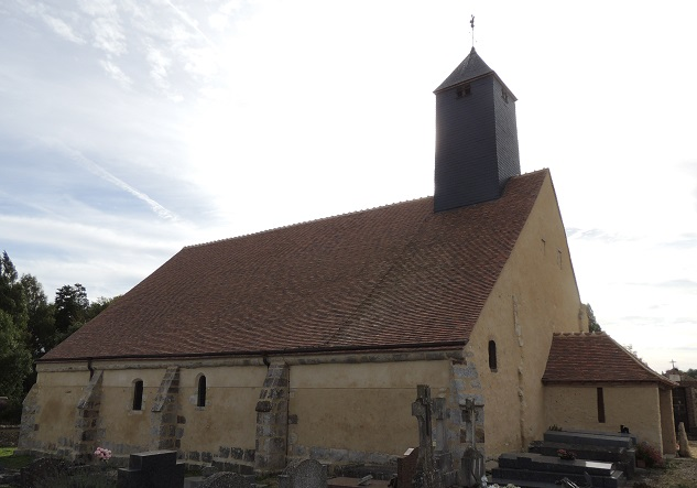 Chapelle Saint-Sulpice, caquetoire et façade occidentale à droite, clocher couvert d'ardoises sur la nef et bas-côté Nord à gauche; Arbres à gauche et cimetière au premier plan